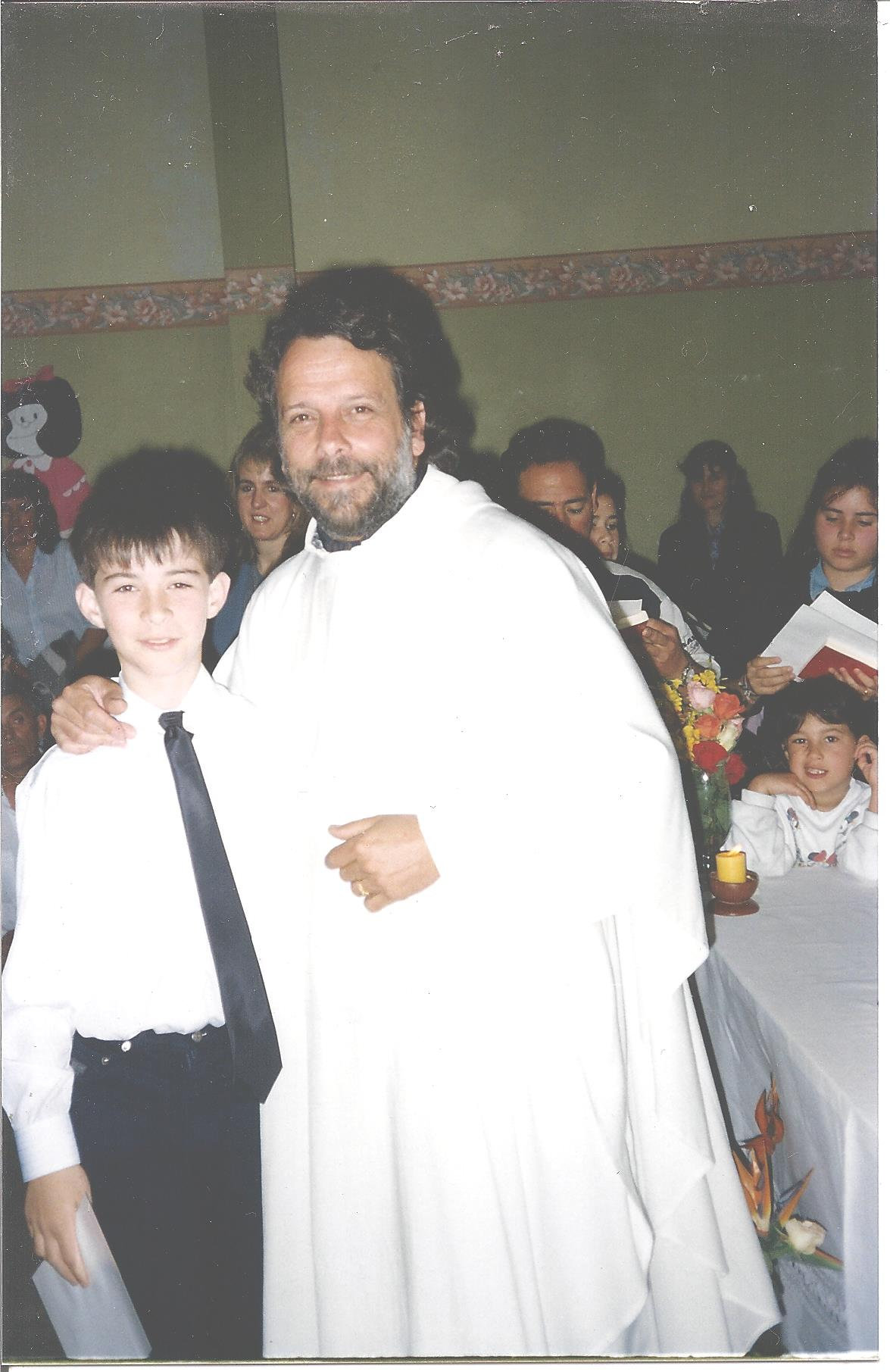 Cajade en una celebración de comunión católica